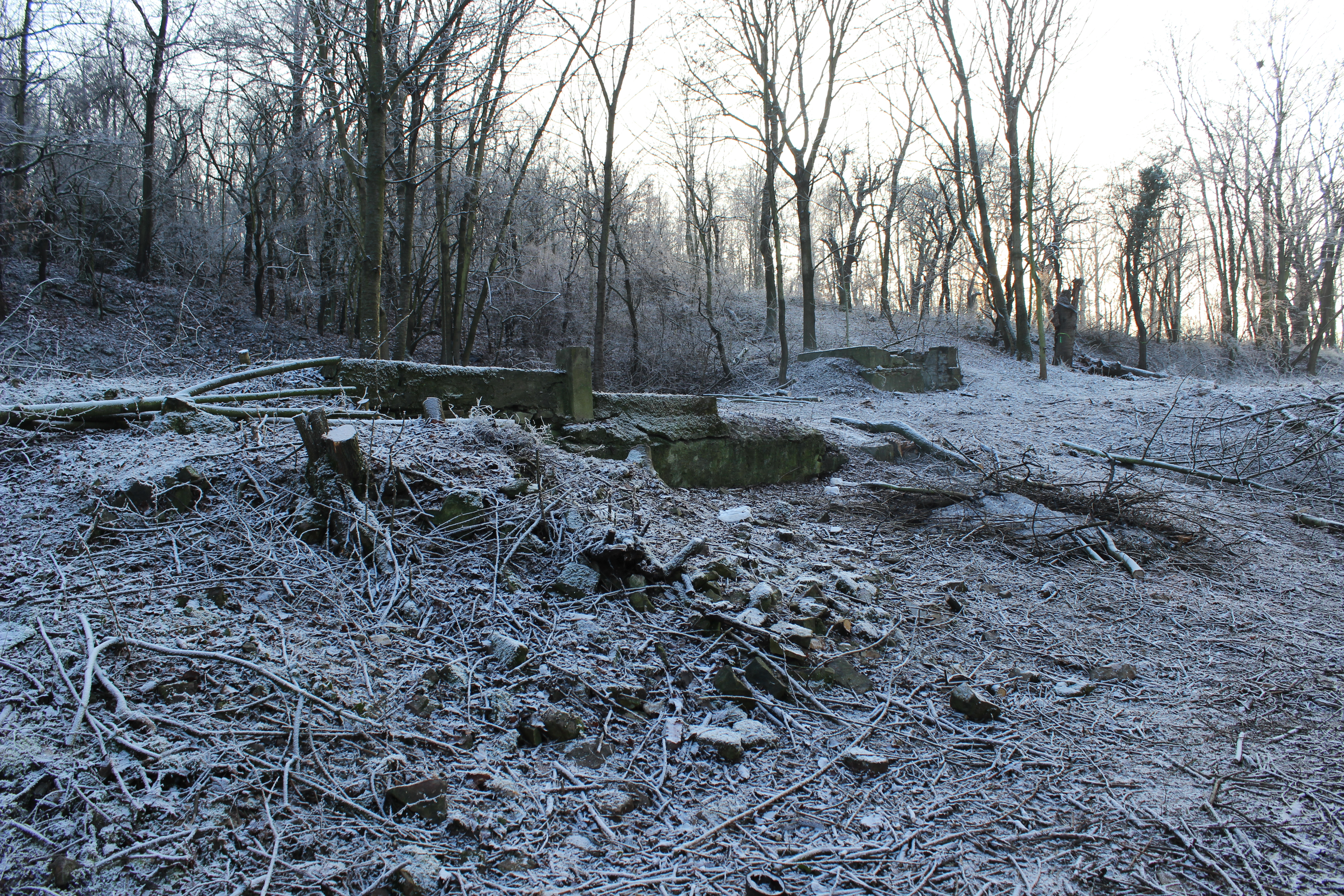 Pozůstatky někdejší usedlosti Truhlářka na svahu Bílé skály.